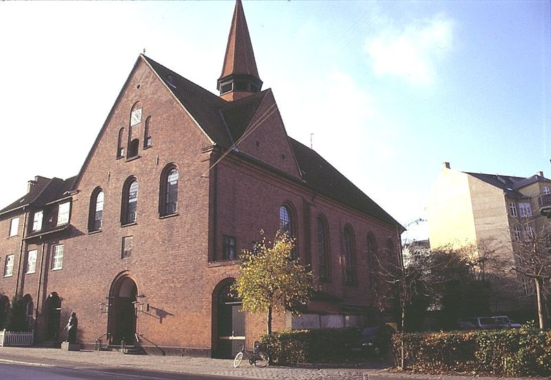 Lutherkirken i Danmark. Lutherkirken